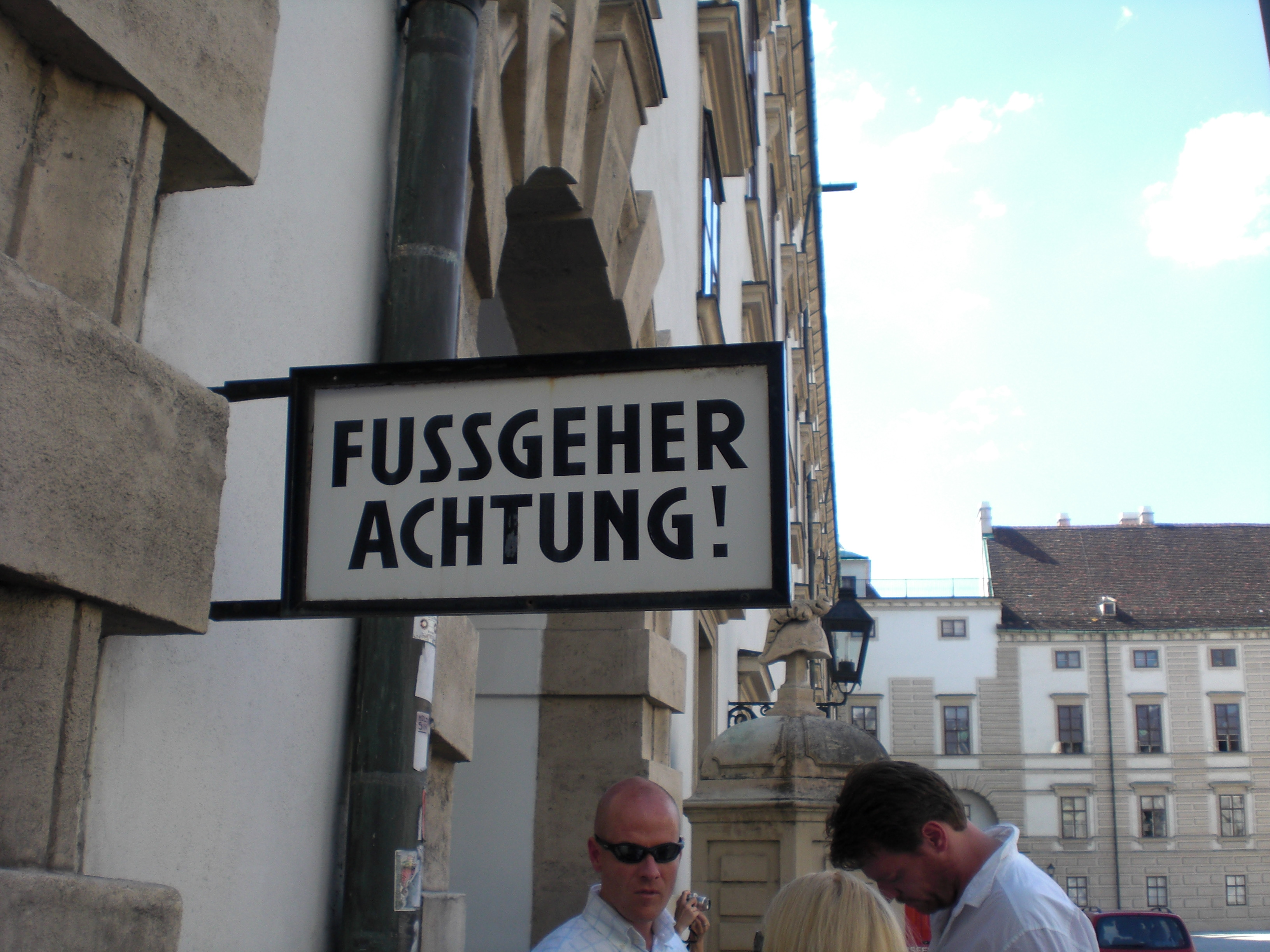 Fussgeher-Schild in Wien